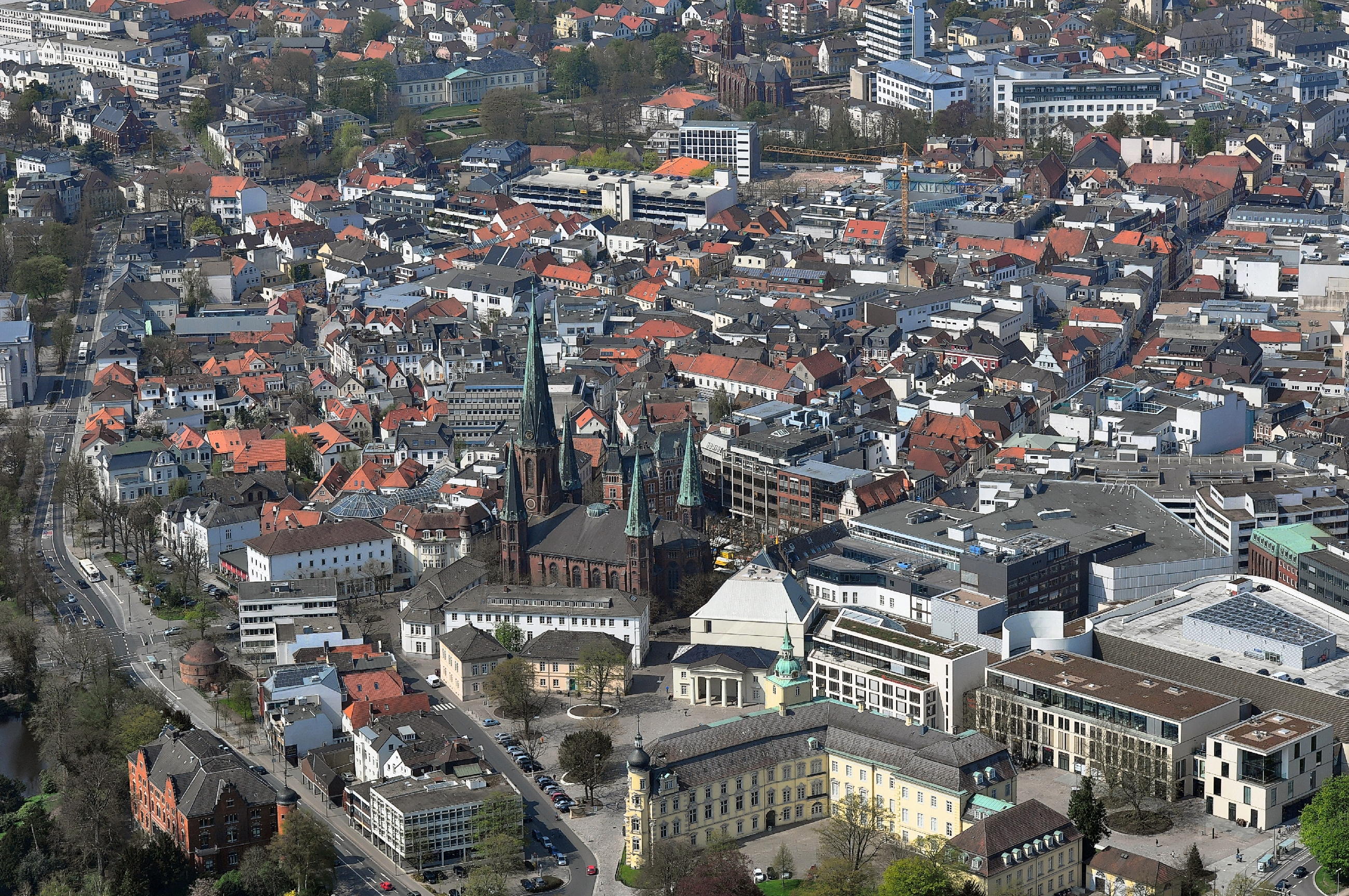 Luftbilder von der Nordseeküste 2013-05